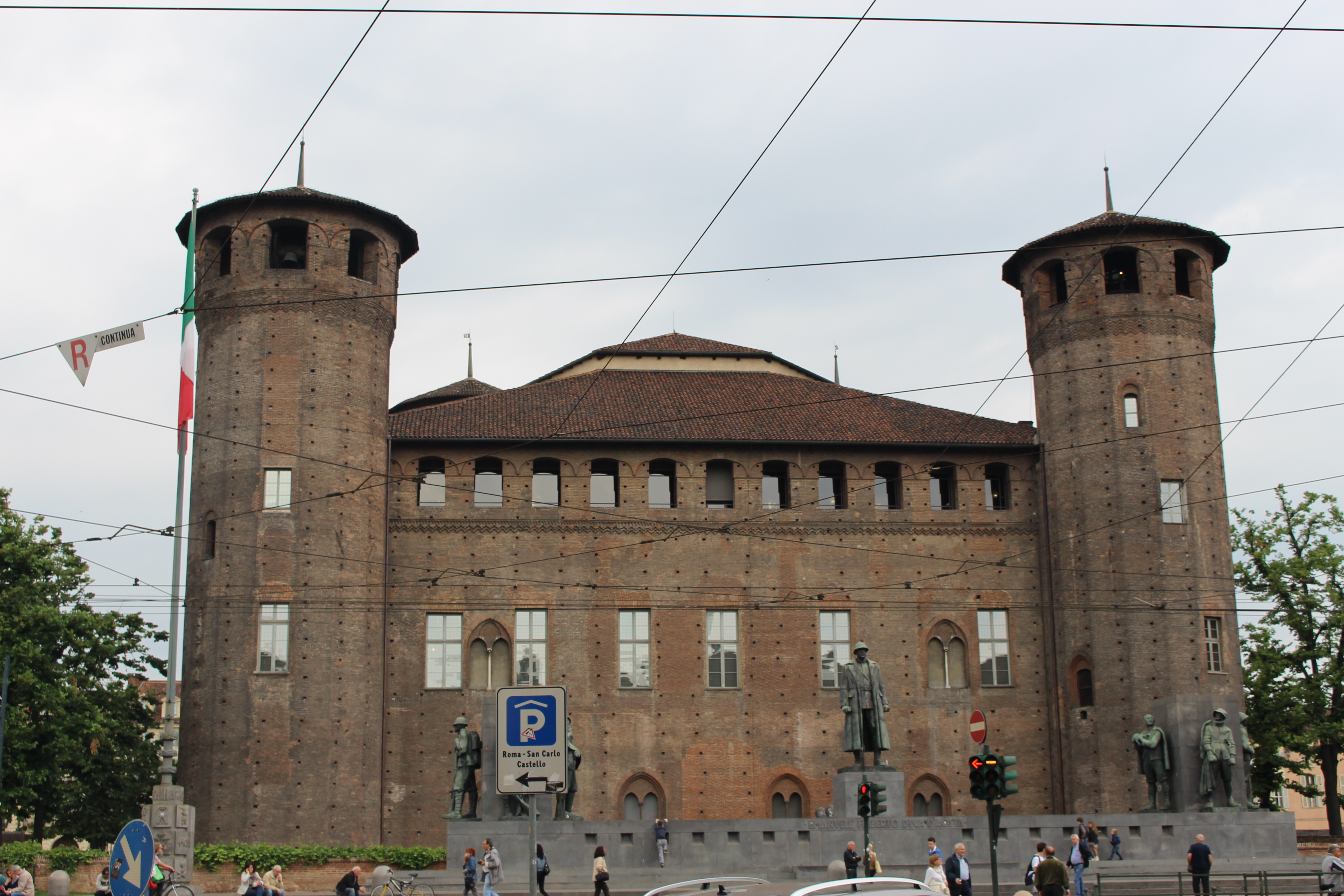 Retro del Palazzo Madama